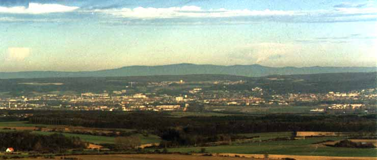 Blick vom Hohen Hagen nach Nordost über Göttingen zum Harz